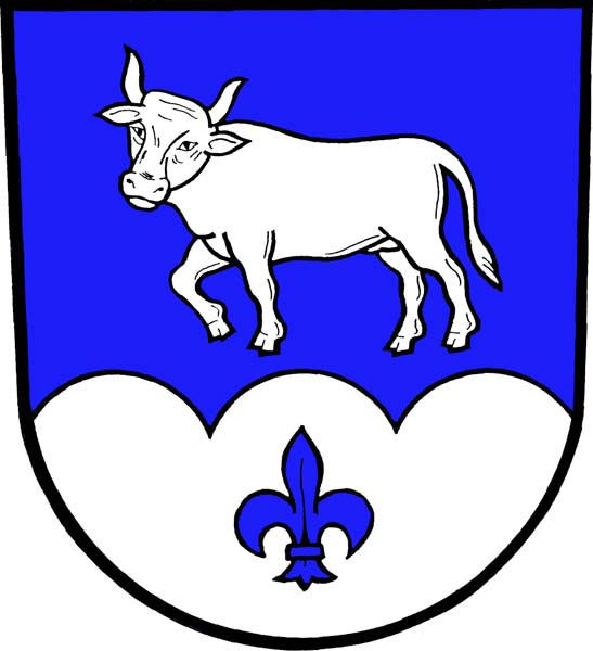 Znak obce Dlouhá Stráň